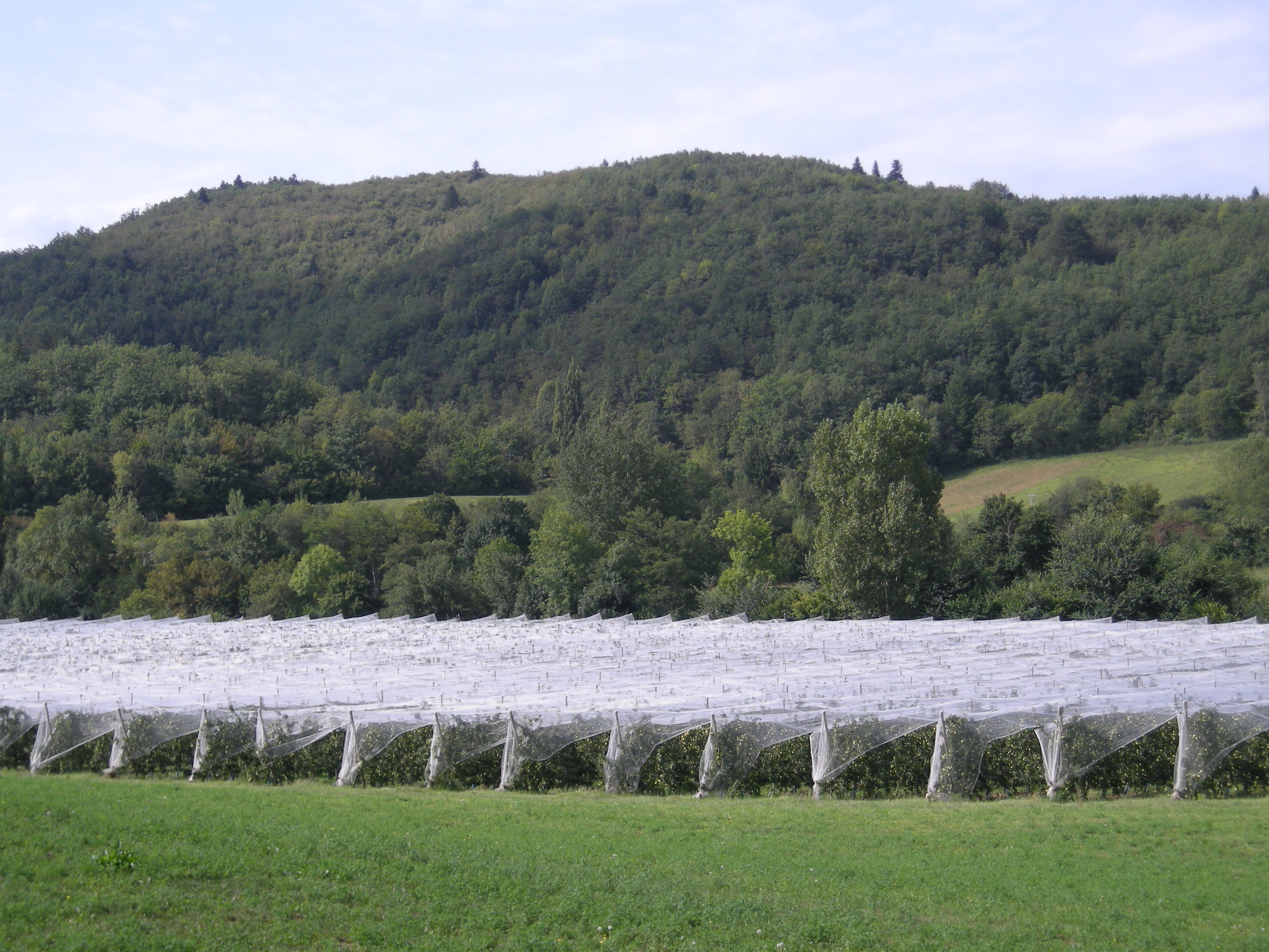 Vergers de pommiers à Sonnac-sur-l'Hers (Aude)